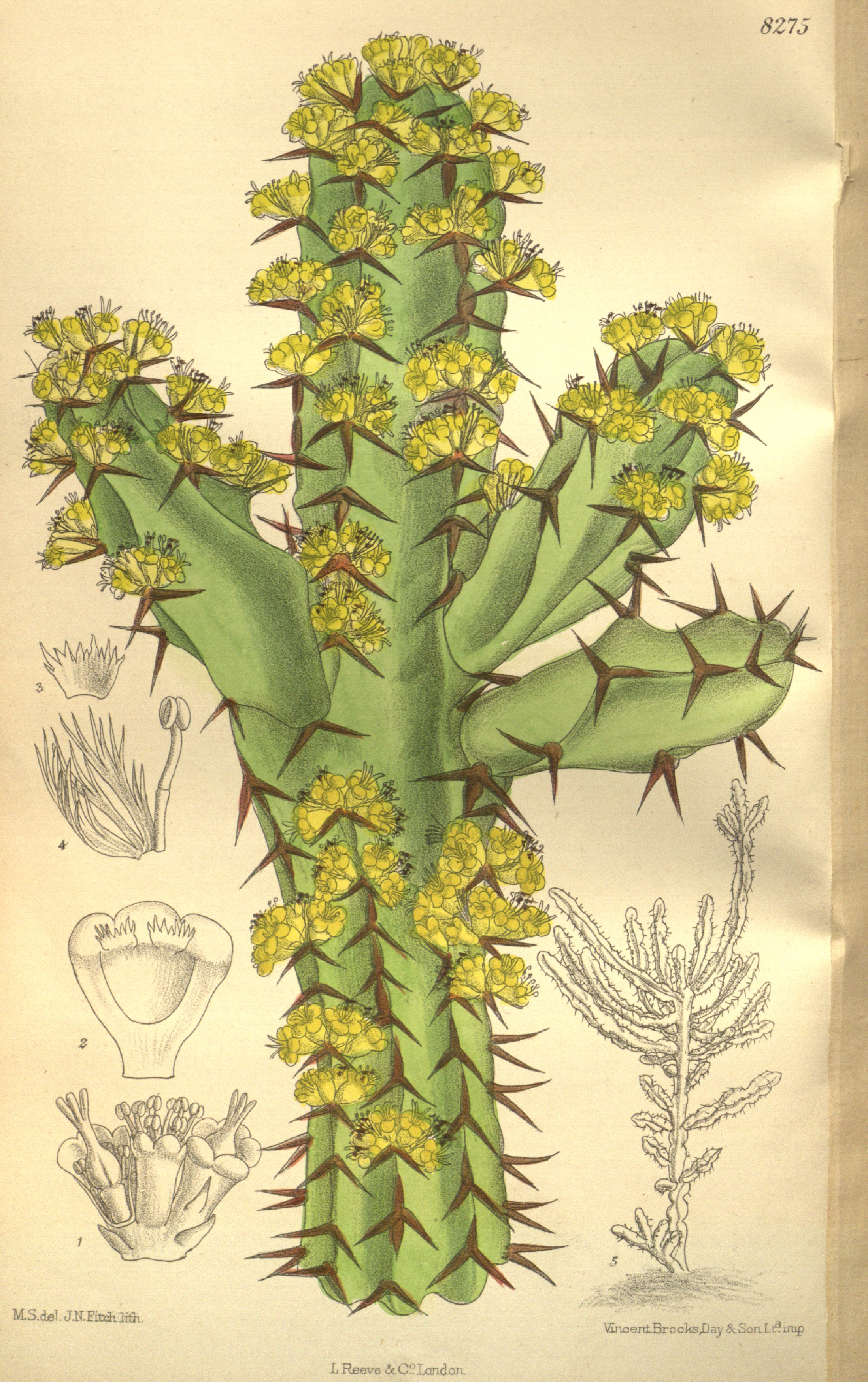 Euphorbia ledienii, Euphorbiaceae